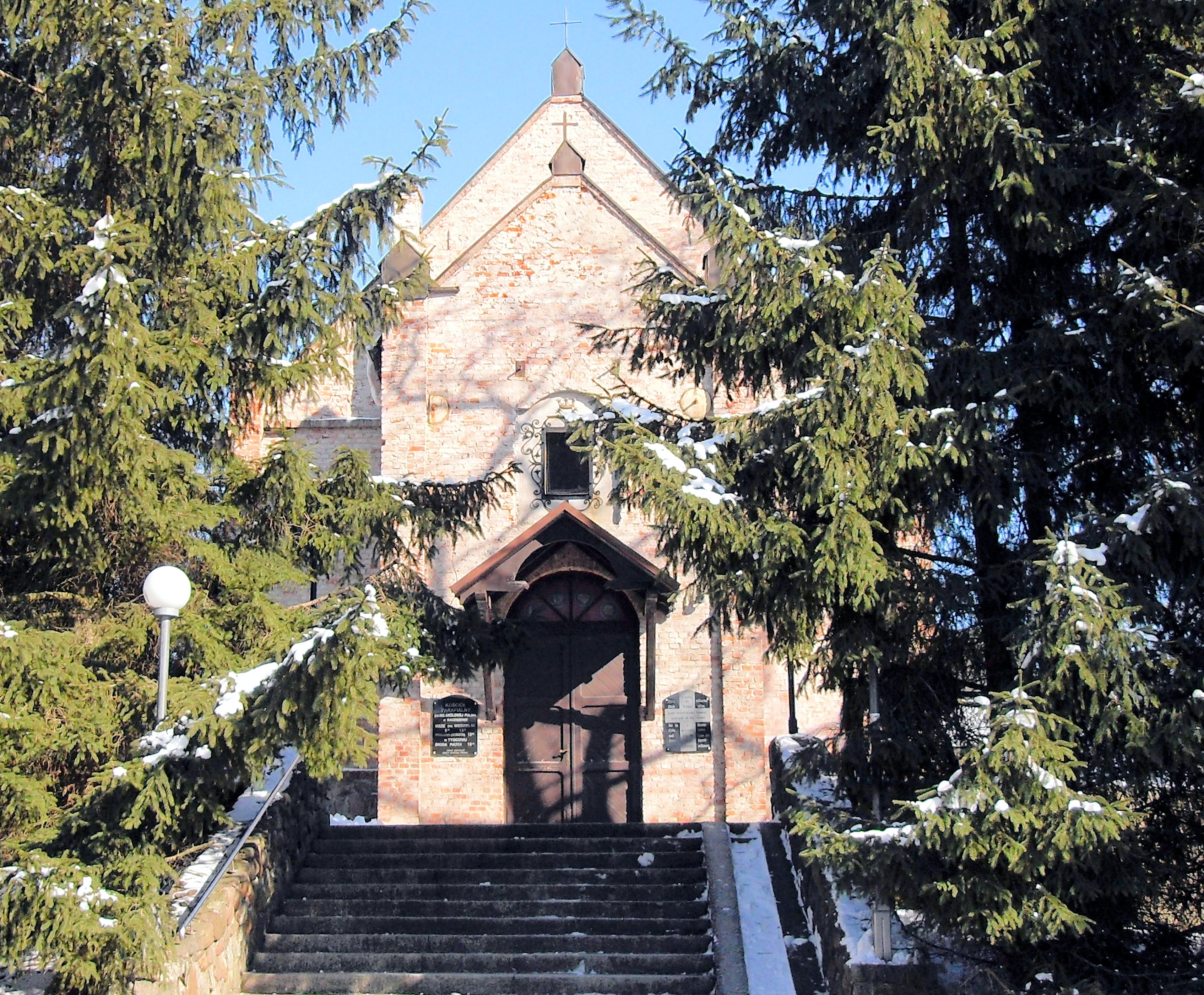 Radziszewo - dawny kościół ewangelicki, obecnie rzymskokatolicki parafialny p.w. Matki Bożej Królowej Polski, 4 ćw. XIX, pocz. XX